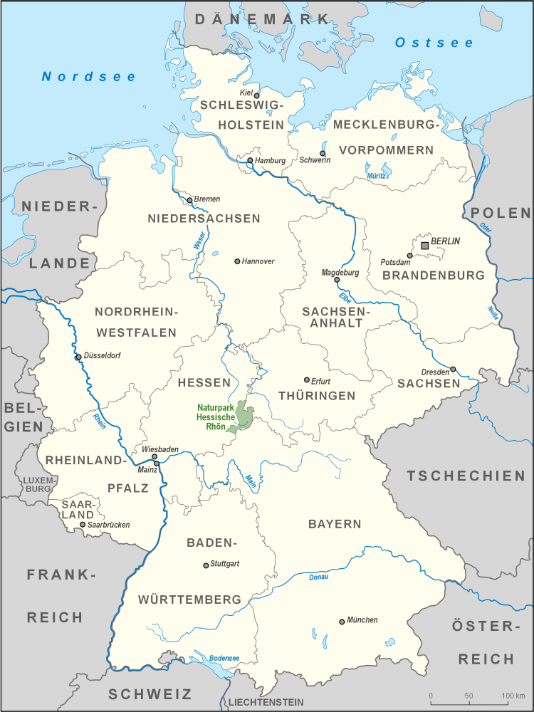 Karte des Naturparks Hessische Rhön in Deutschland